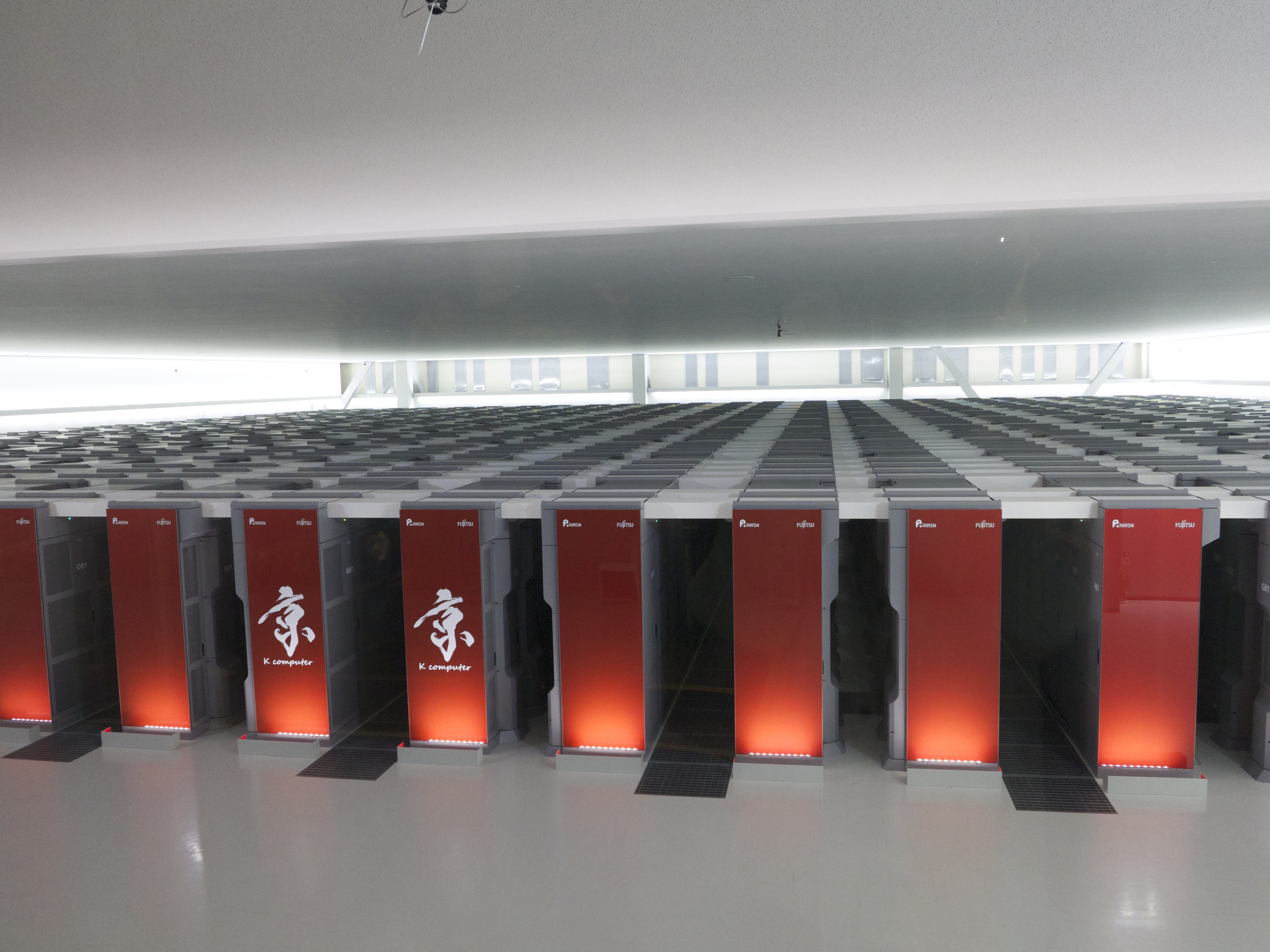 京の全貌